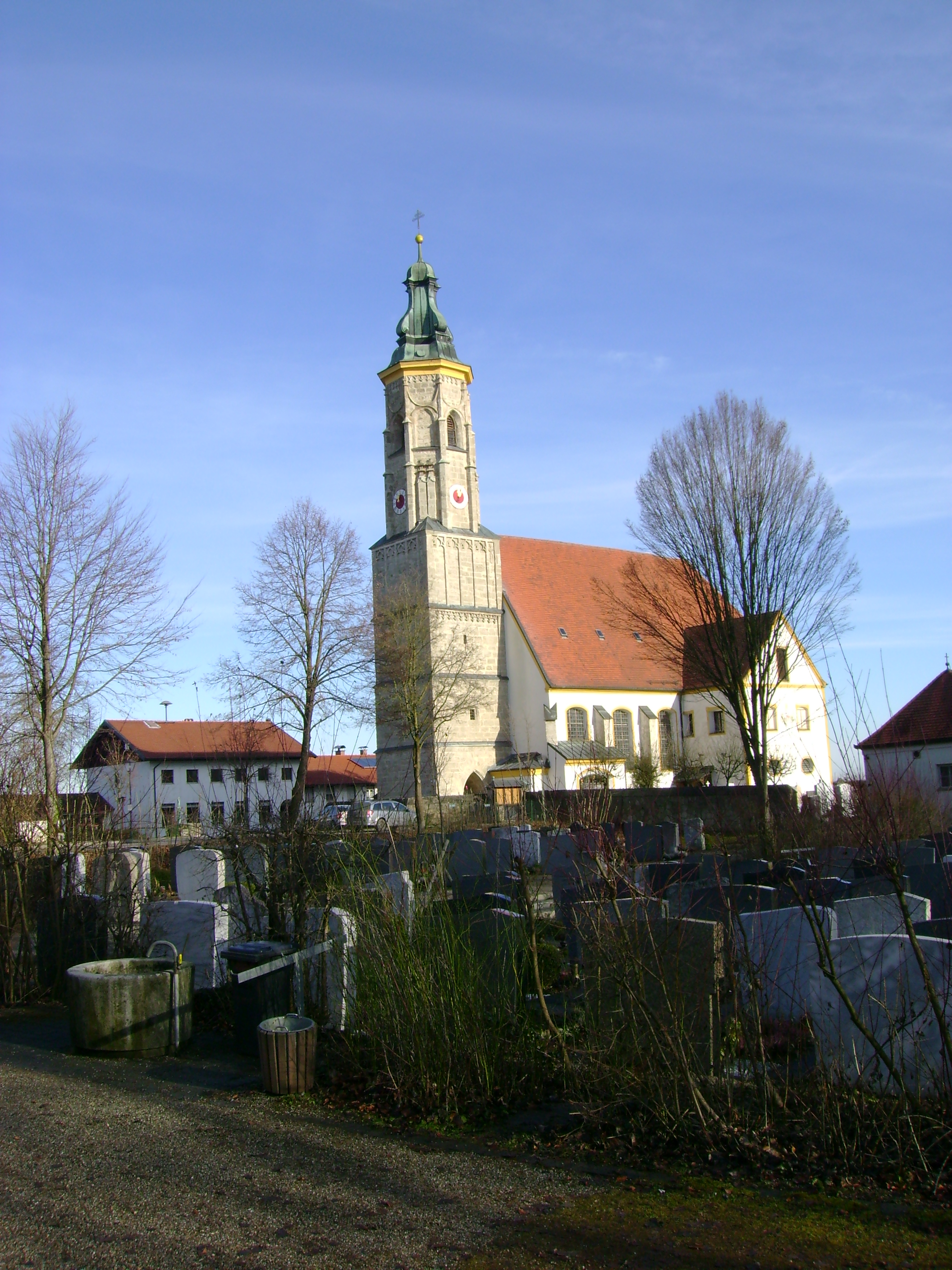 Church in Margarethenberg an der Alz, Gem. Burgkirchen (AÖ)